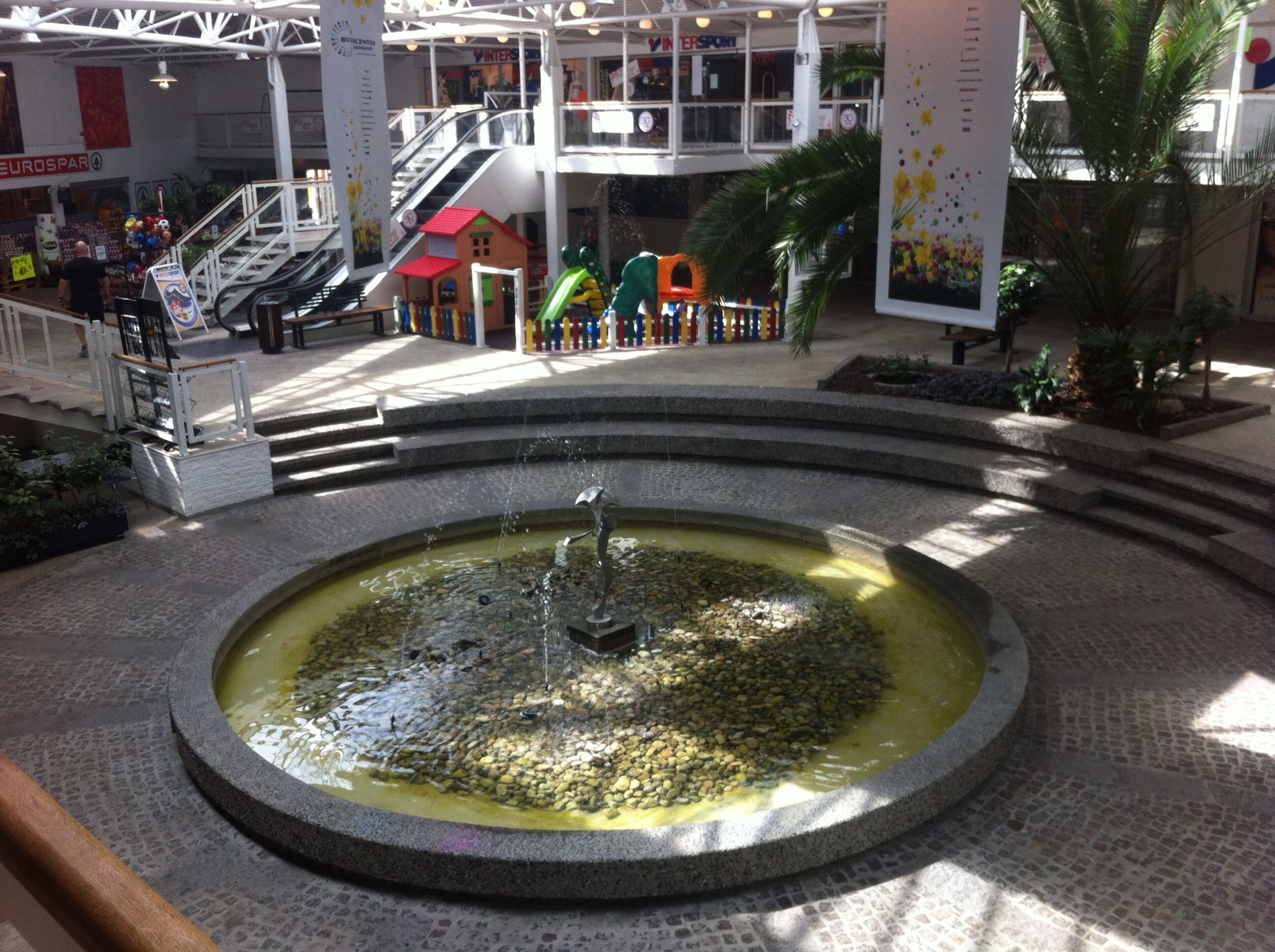 Hadsund Butikscenter, Storegade, 9560 Hadsund.